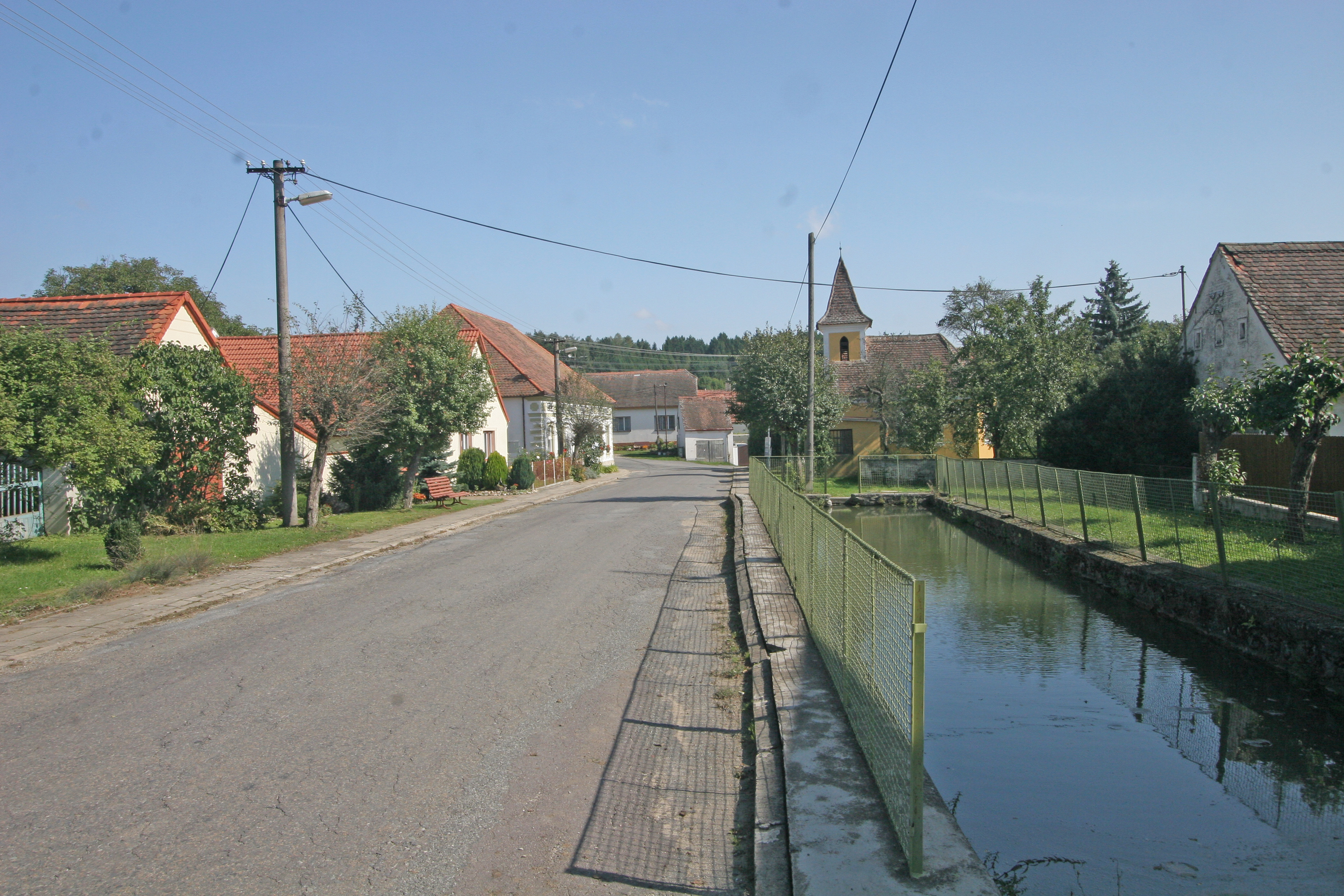 Zblovice nádrž